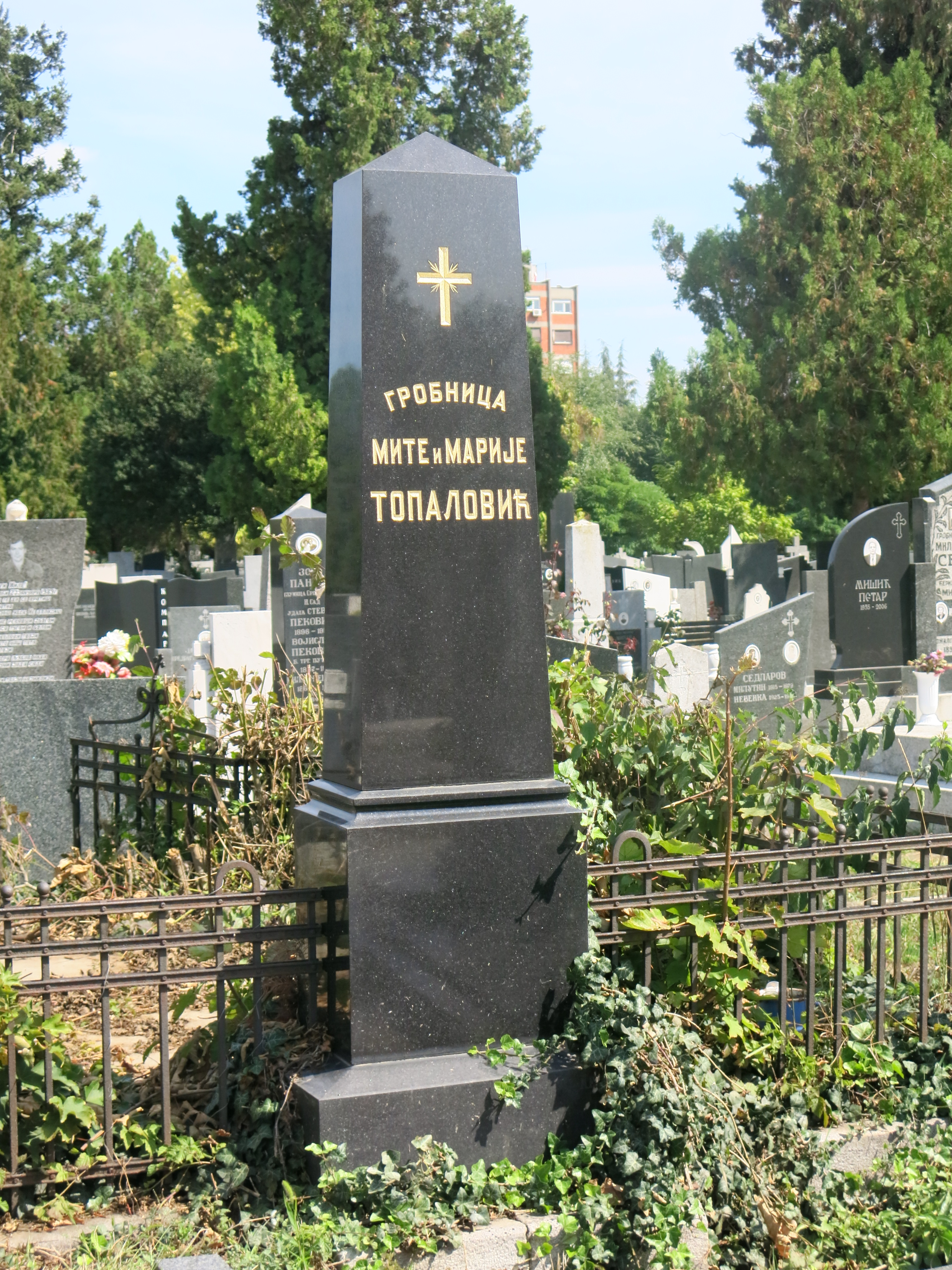 Надгробни споменик композитора Мите Топаловића